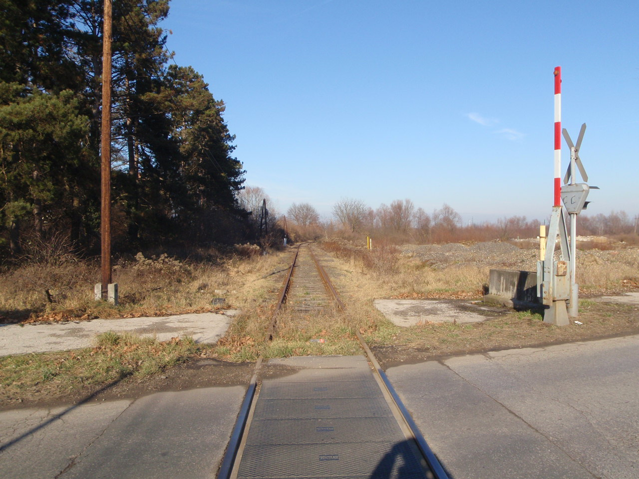 Körmend-Zalalövő vasútvonal használaton kívül 2012